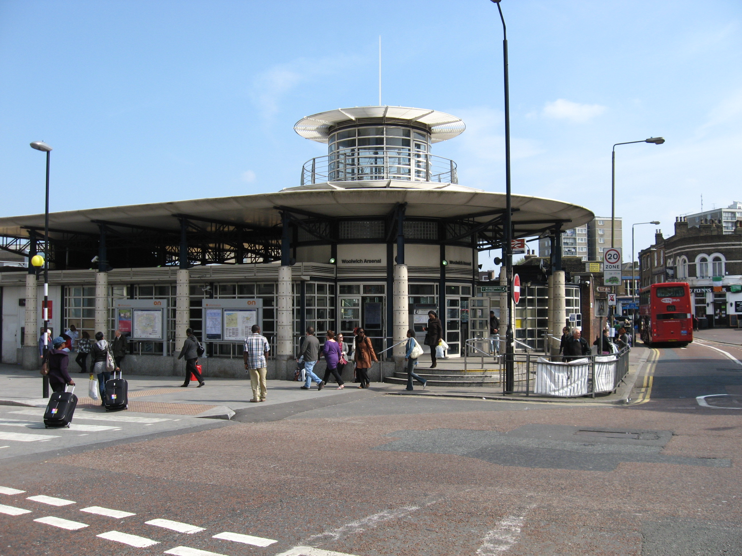 De ingang van Woolwich Arsenal station